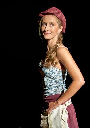 Agnieszka Sitek - spektakl "Kibice" - Teatr TM